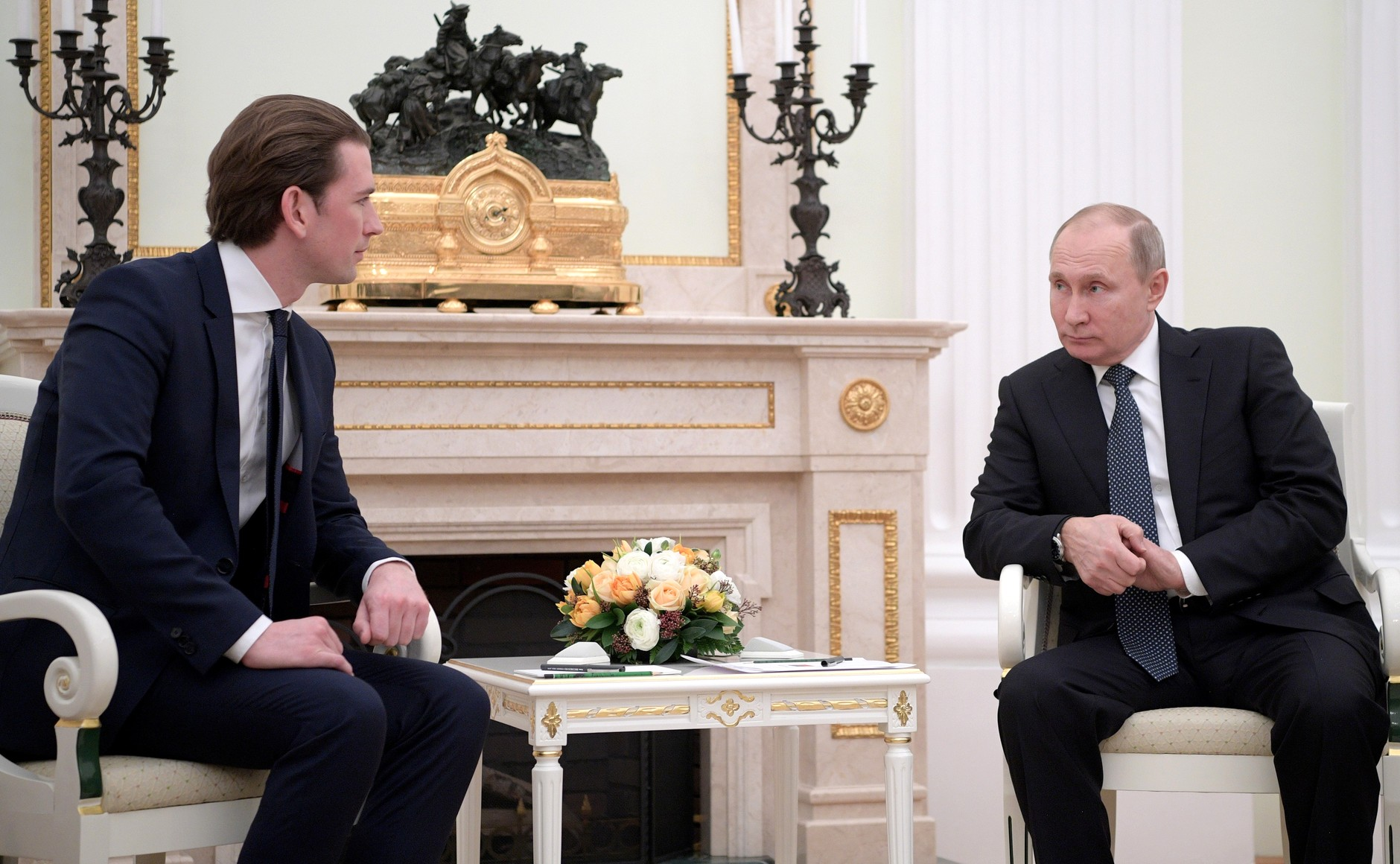 Встреча Президента России Владимира Путина с Федеральным канцлером Австрии Себастианом Курцем